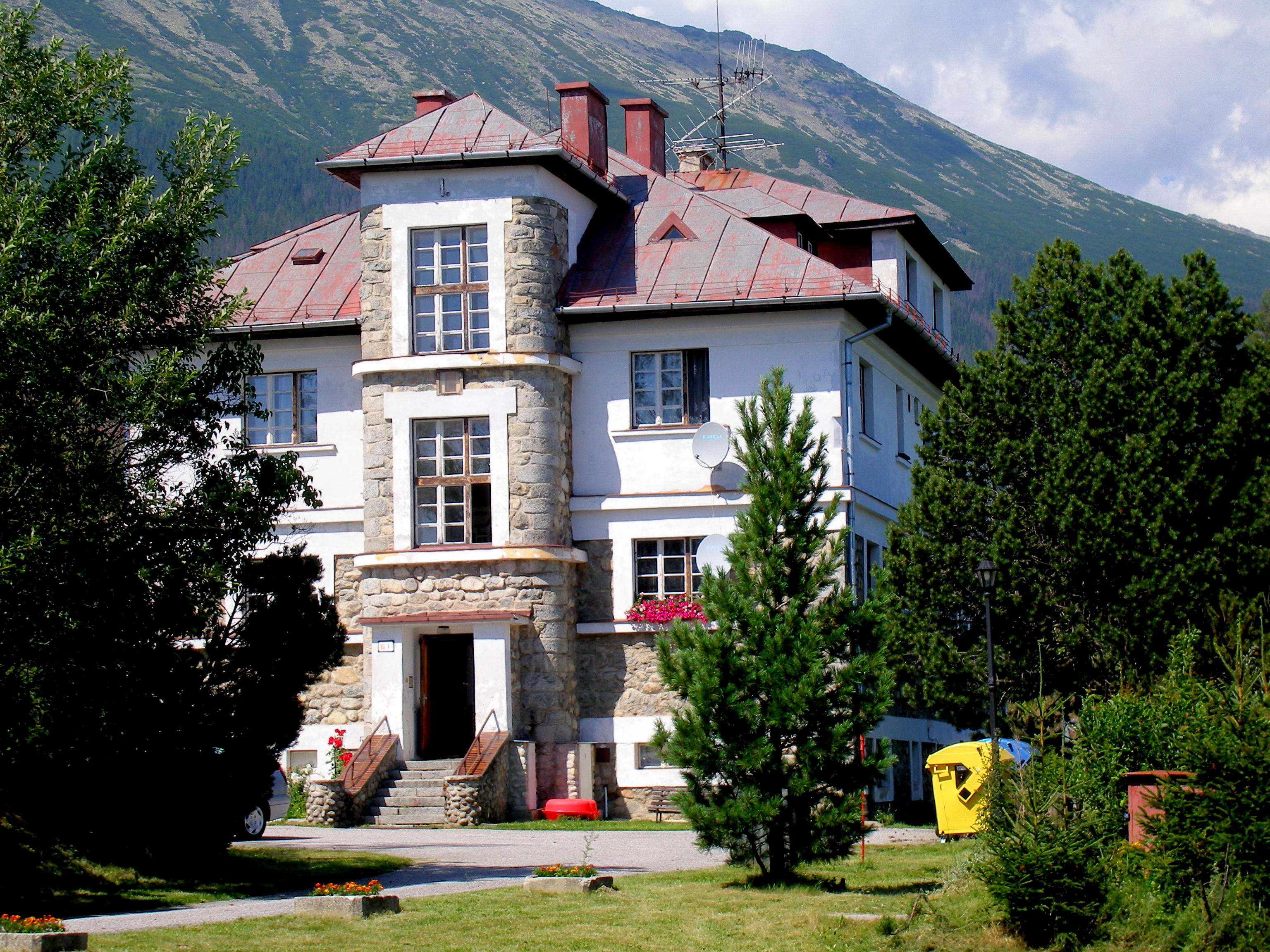 Tatranská osada Tatranské Zruby, mesto Vysoké Tatry, okres Poprad